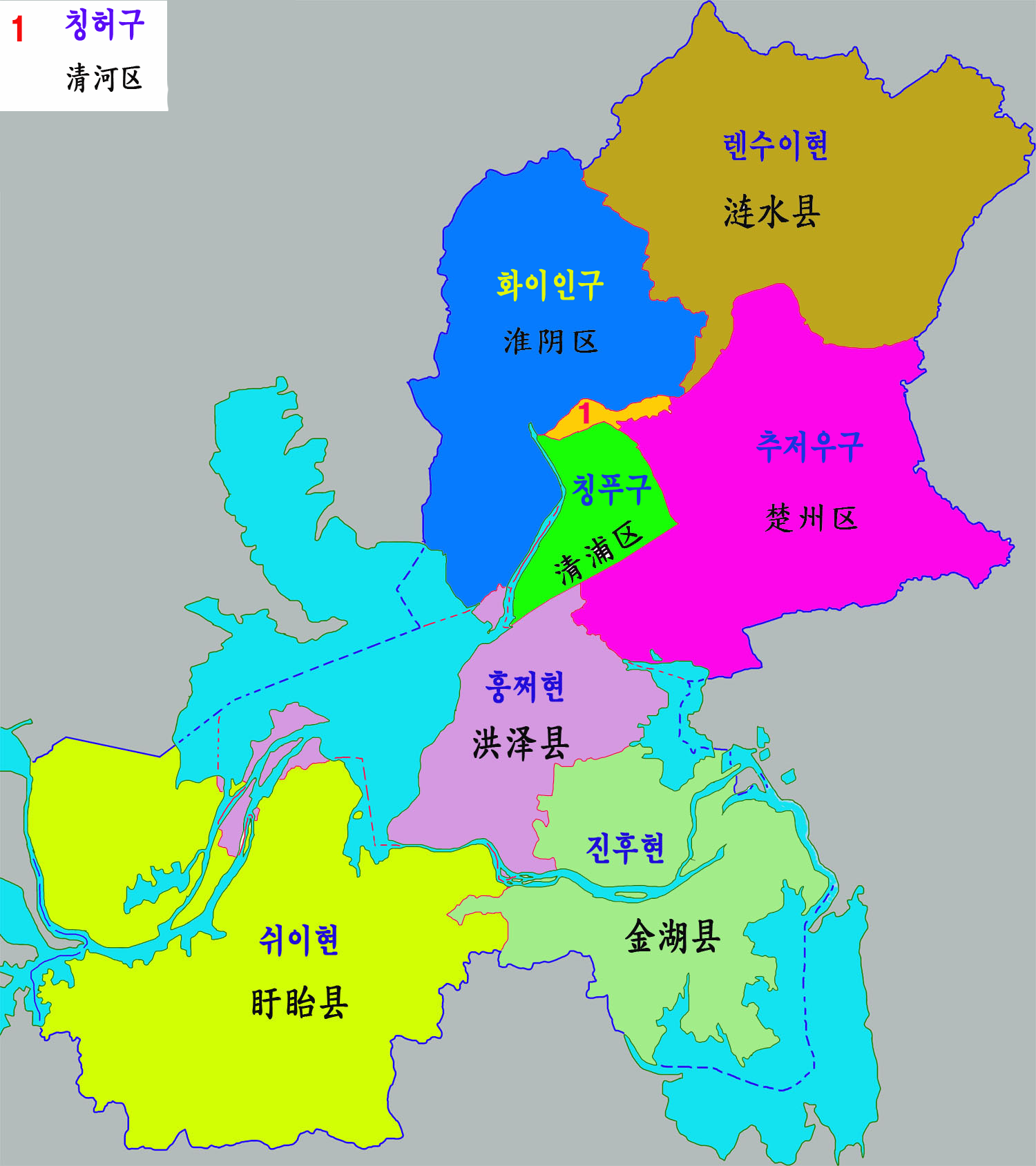 화이안시 현급행정구역